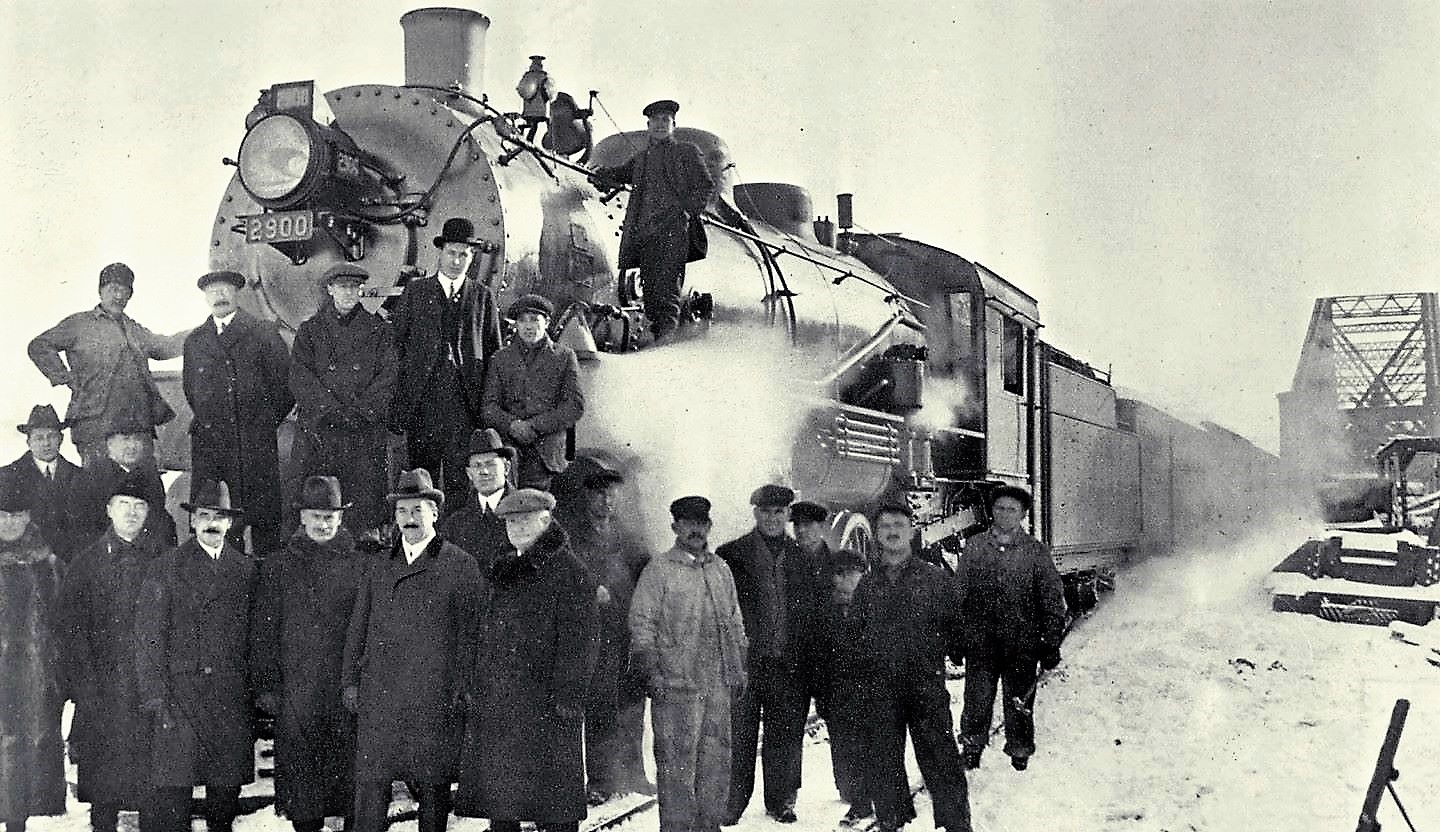 Passage du premier train sur le pont de Québec en 1917 « À 11 heures, le 3 décembre 1917, le premier convoi régulier franchit le pont de Québec de la rive sud à la rive nord. Il s’agit d’un train de fret du chemin de fer Transcontinental. La locomotive à vapeur de ce train inaugural vient d’être fabriquée aux usines de la Montréal Locomotive Works. Il s’agit de la Mikado portant la matricule 2900 du chemin de fer Transcontinental. Au cours de son périple historique sur le pont de Québec en ce 3 décembre 1917, ce train à vapeur est sous la responsabilité de deux des plus anciens employés du Transcontinental, MM. Georges Walker et Edward Parsons, qui recevront d’ailleurs une médaille de bravoure pour leur exploit. À la sortie nord du pont de Québec, les deux employés immobilisent la locomotive et pendant qu’ils descendent de la cabine, les invités se regroupent à l’avant du train pour la photo d’usage. Aucune cérémonie officielle n’accompagne cet événement qui est pourtant d’une importance capitale pour la ville de Québec et le pays tout entier. » – Michel L’Hébreux, Société historique de Québec